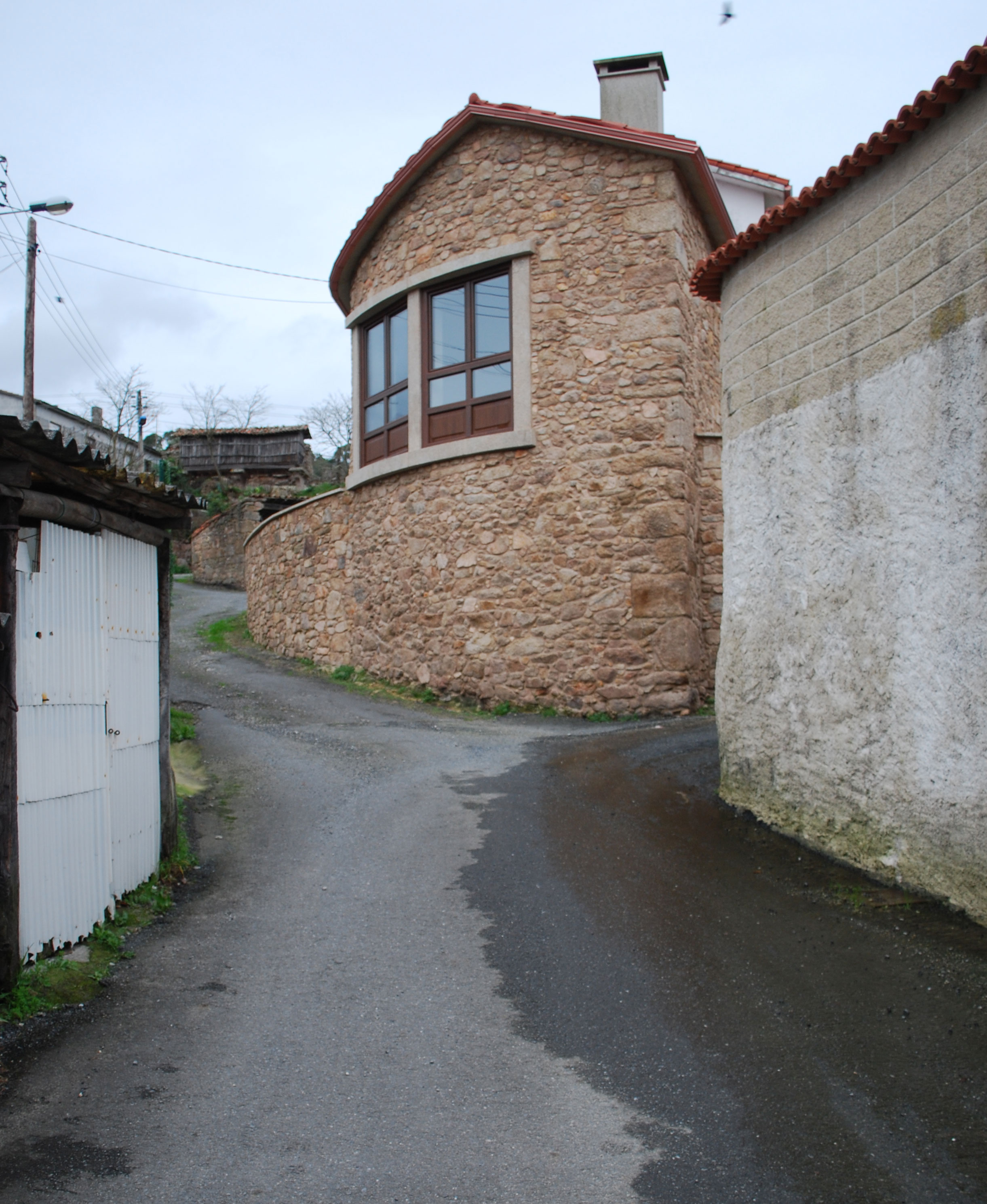 Rúa en Souto Morás Arteixo A Coruña Galiza Spain